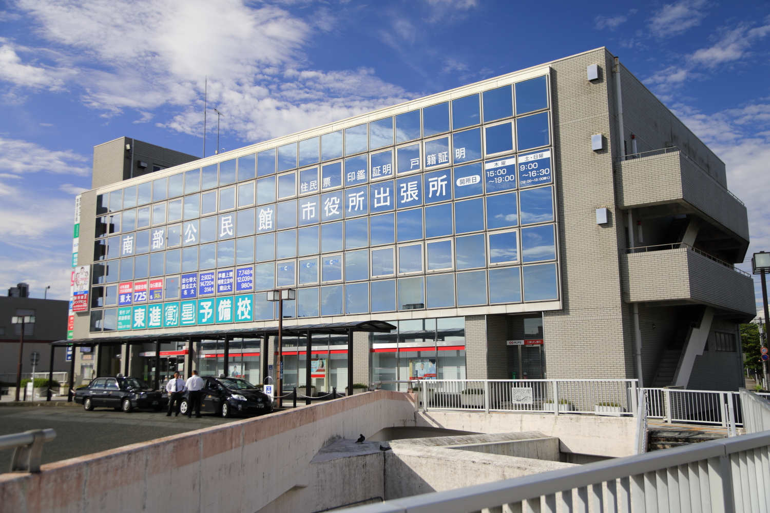 パルネス2号館外観（豊明市、2018年（平成30年）7月）